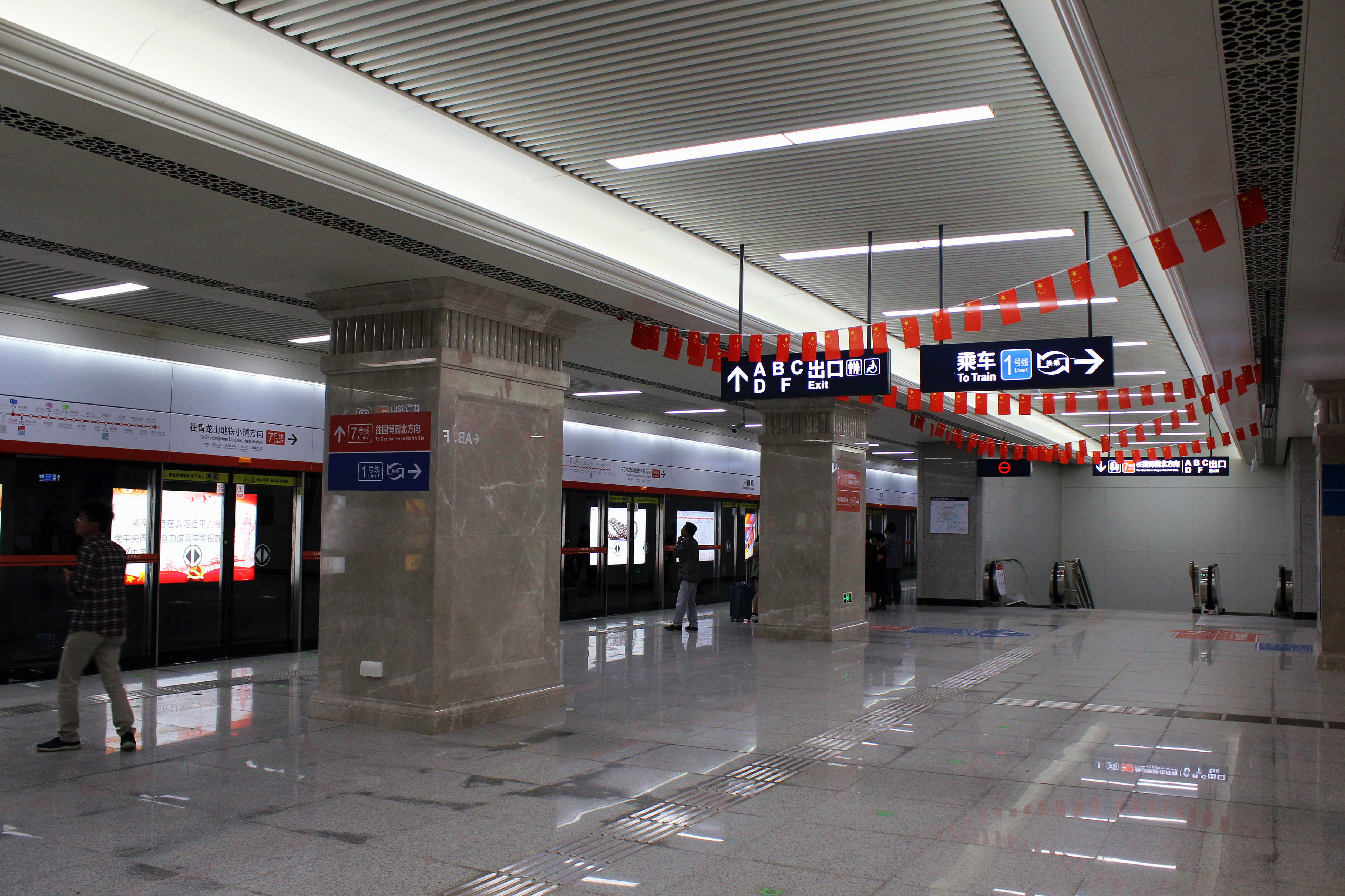 武汉地铁7号线三阳路站